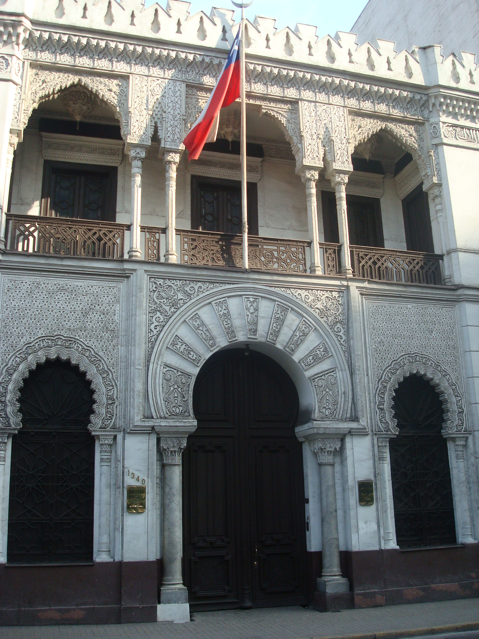 Palacio de la Alhambra, Santiago, Chle